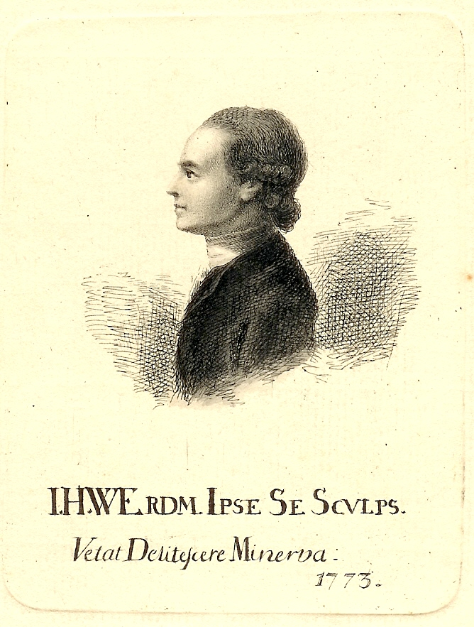 Eigenhändig gestochenes Portrait des Johann Heinrich Werdmüller nach Johann Heinrich Weiss von 1773